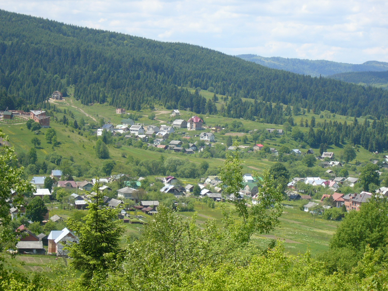 Східниця